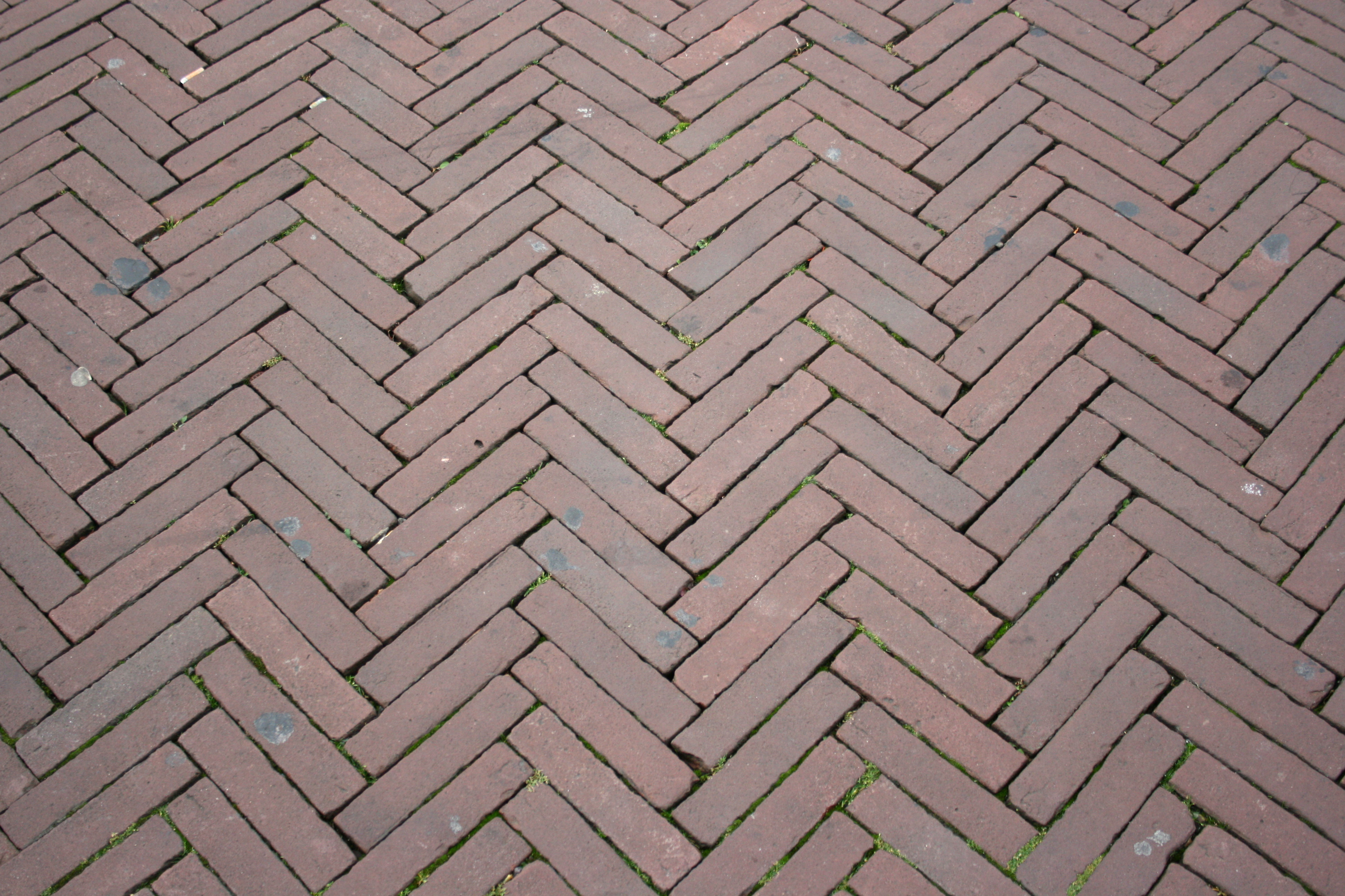 Markt in Geldern